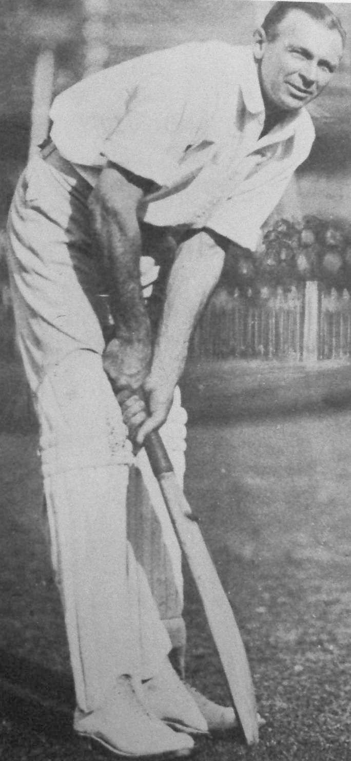 Ian Craig